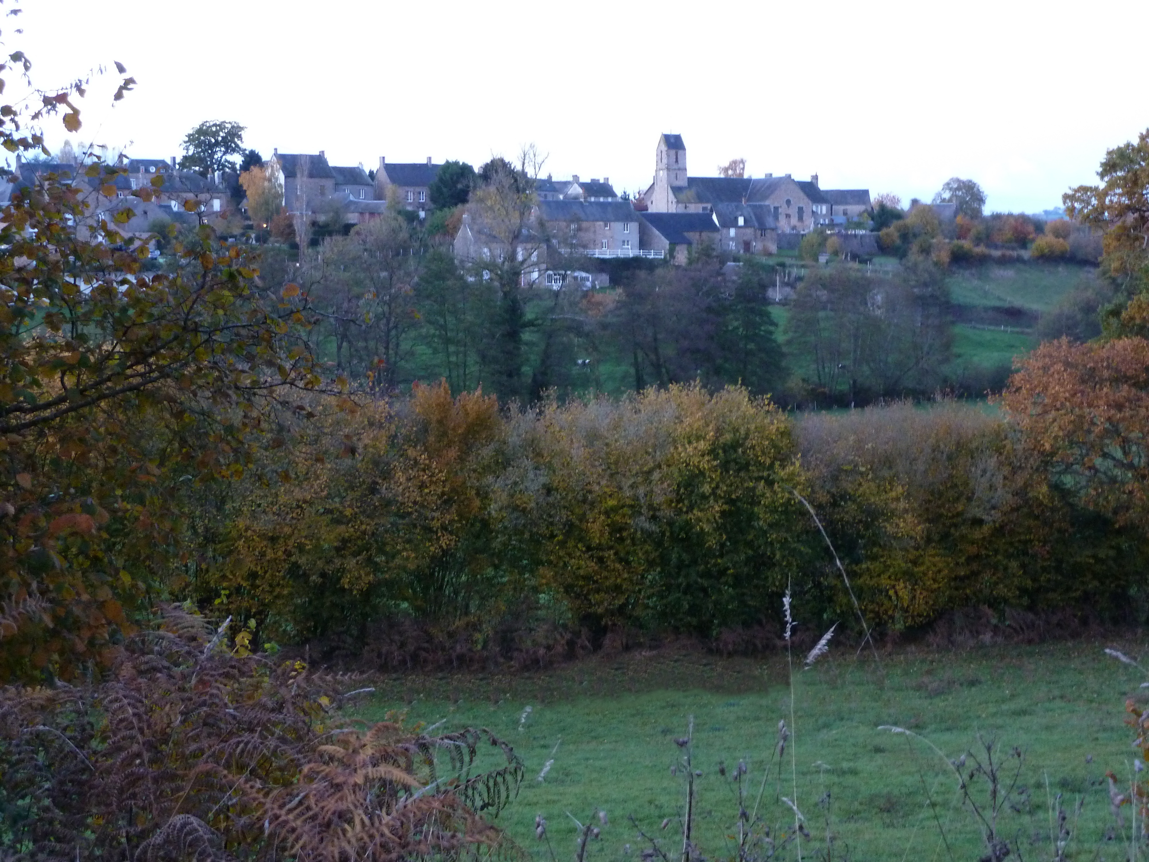 Photo du Bourg de Cerisy-Belle-Etoile, prise de la Vallerie